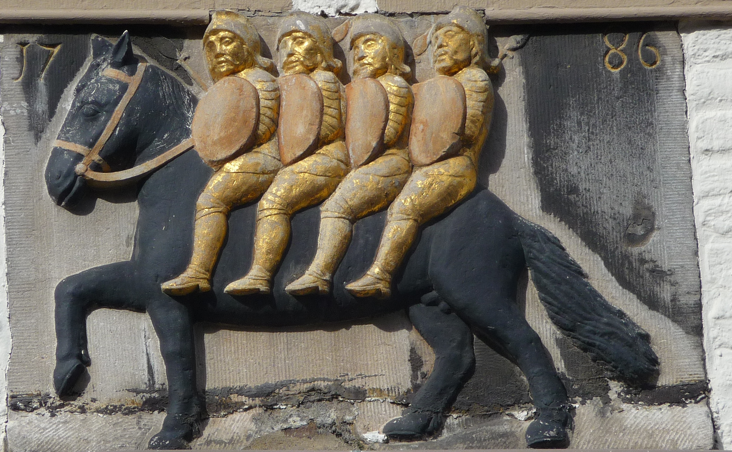 Own work Rijksmonument Grote Gracht 42 in Maastricht met gevelsteen van de Vier Heemskinderen daterend uit 1786.